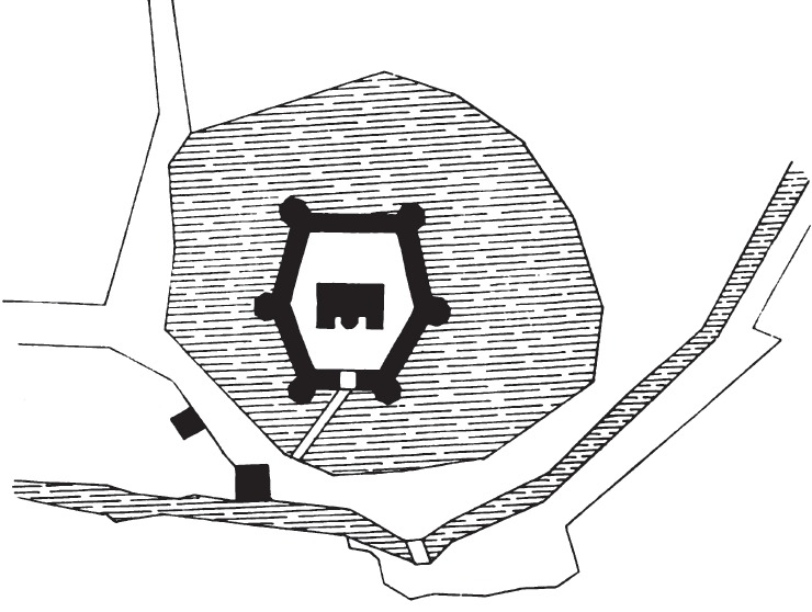 Lageplan des Schlosses Holte vom Ende des 19. Jahrhunderts